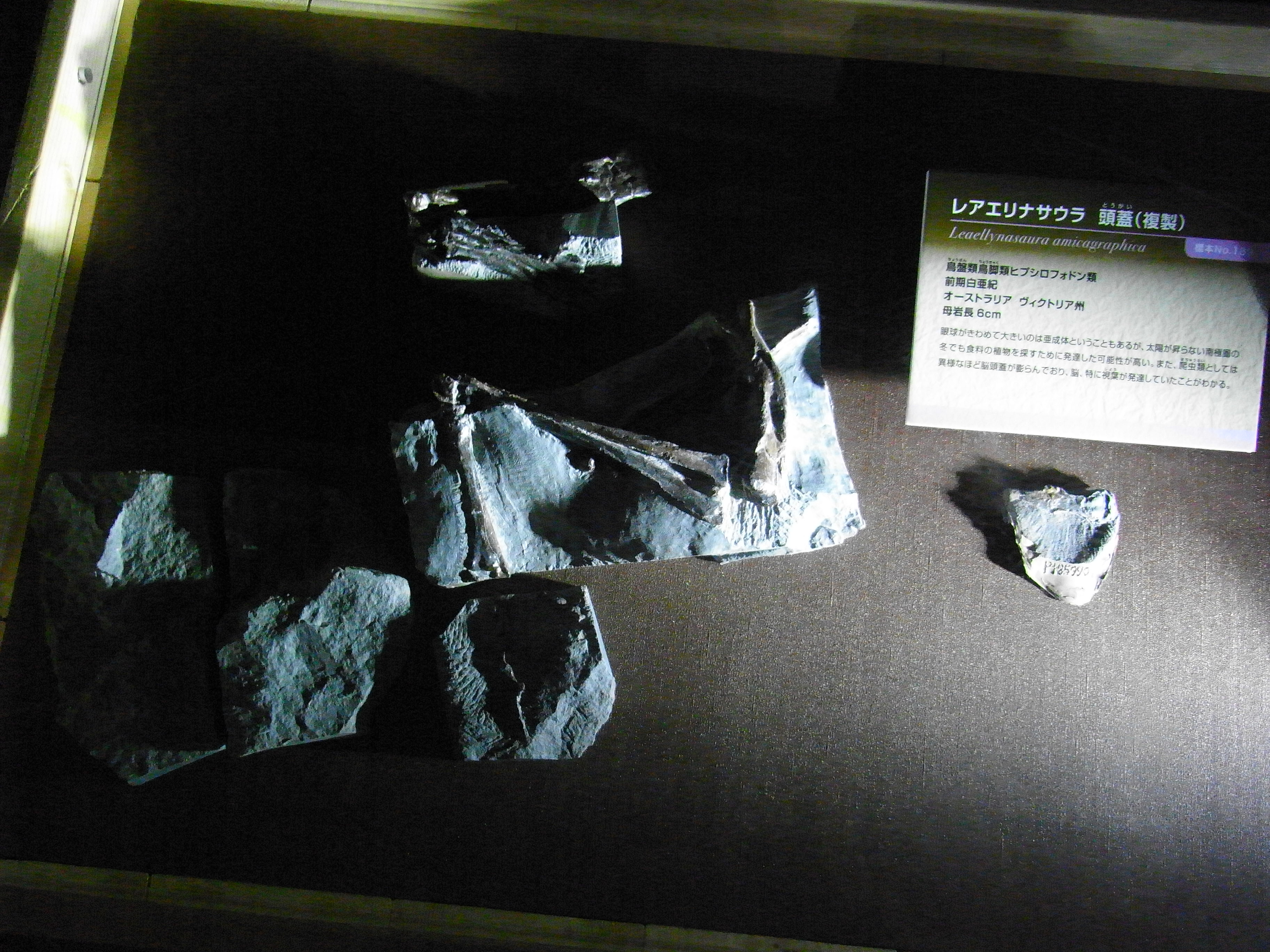 複製ですが。